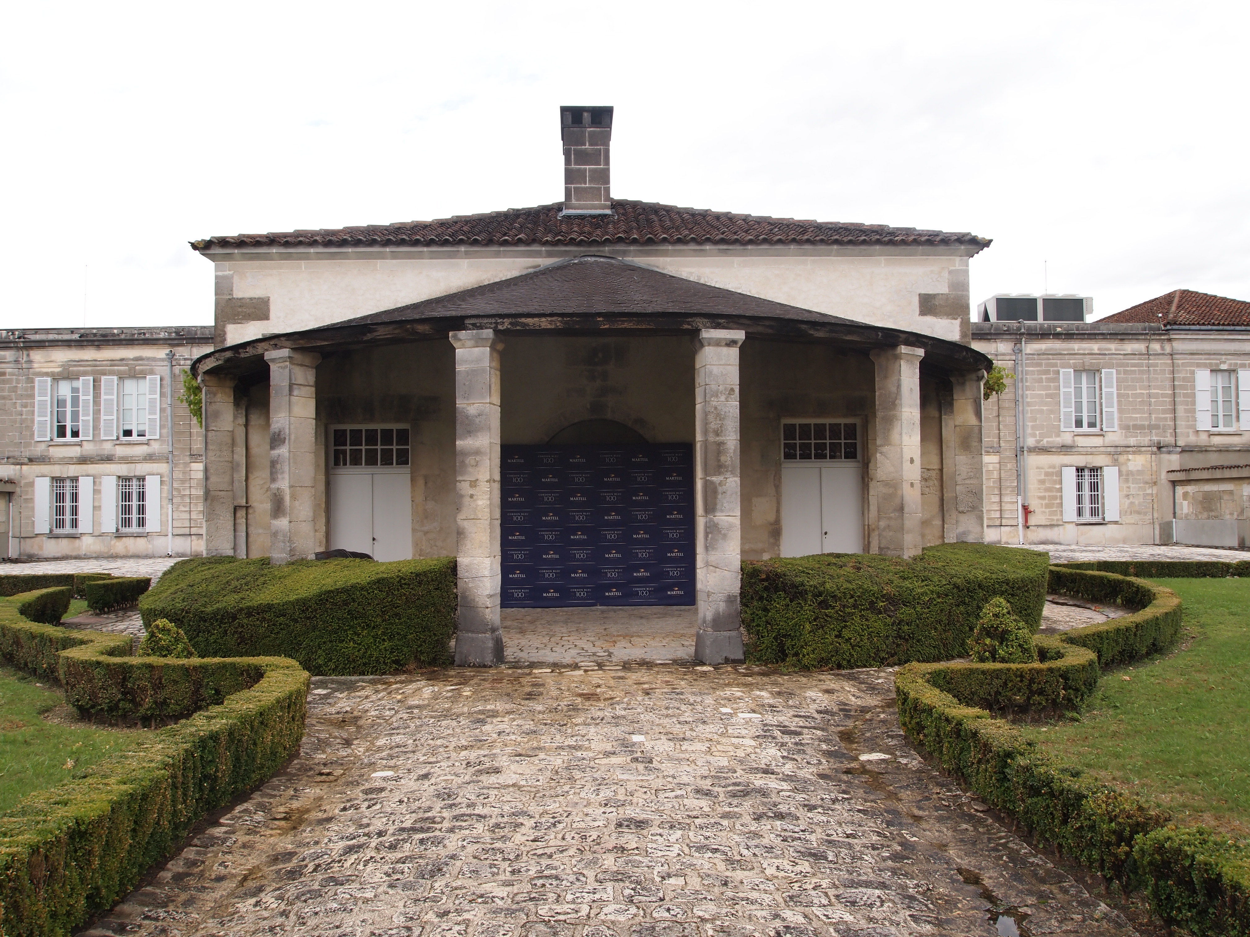 Maison Martell, à Cognac en Charente (France) (inscrit, 1995). La coquille au milieu d'une cour carrée, habitation du fondateur de Jean Martell et entourée des bâtiments construits en 1850 par l’architecte Eugène Demangeat.